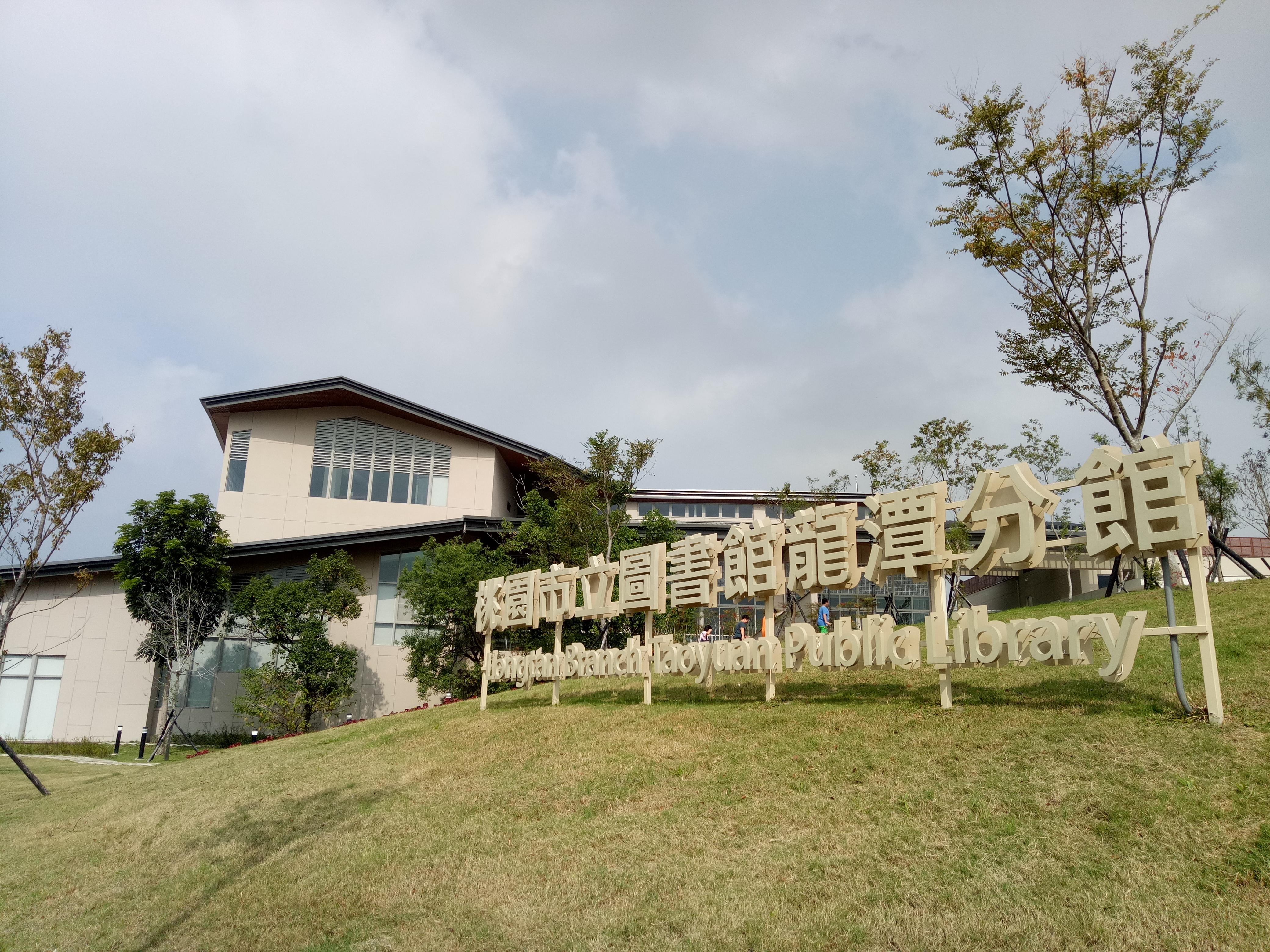 桃園市立圖書館龍潭分館，位於龍潭行政園區的新館。